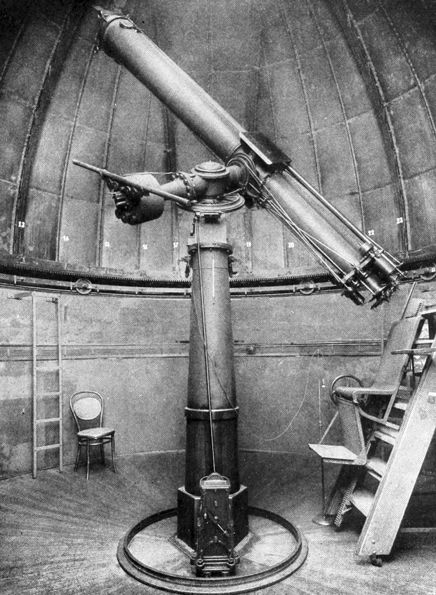 Refraktometer der Leipziger Sternwarte um 1909